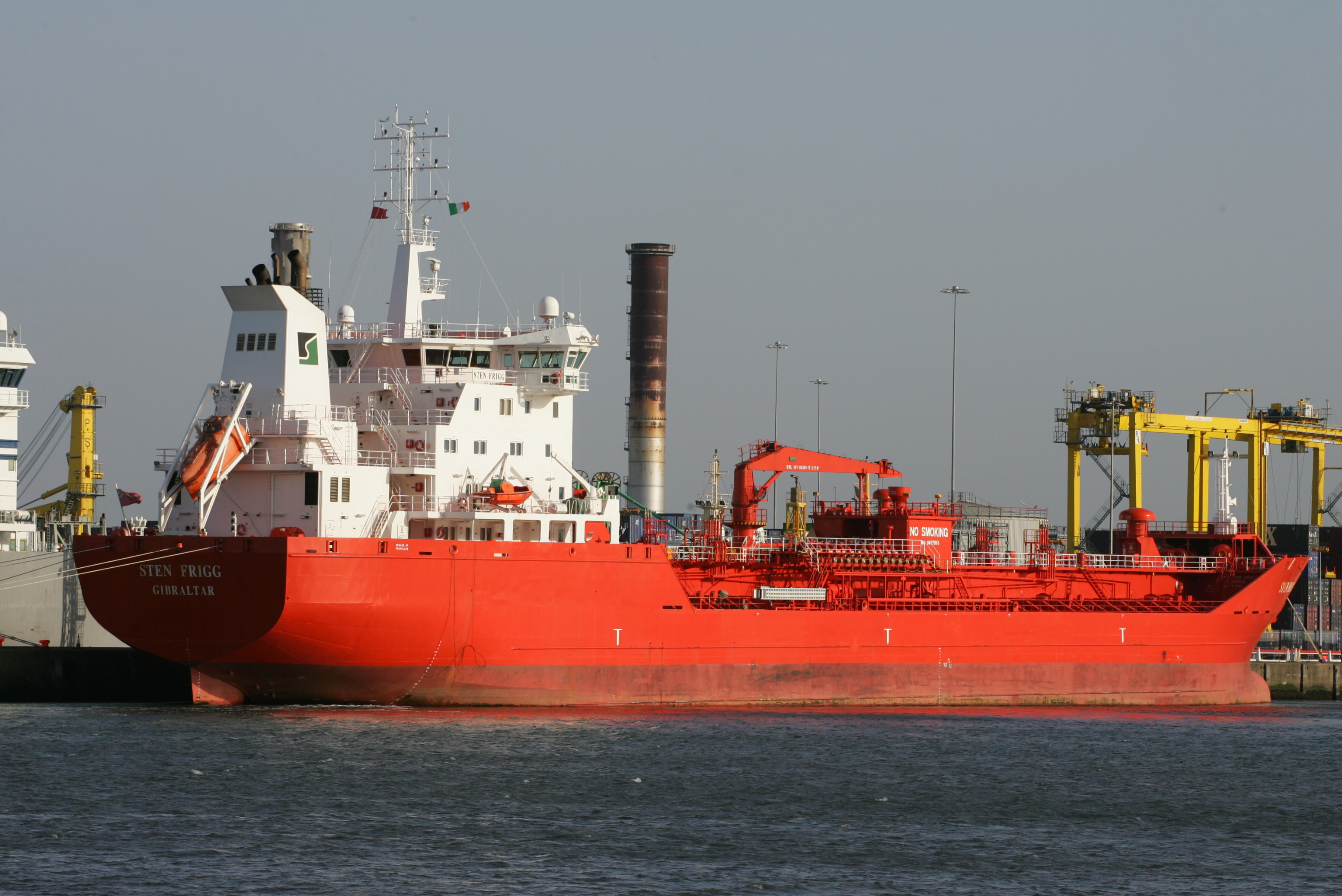 MV Sten Frigg